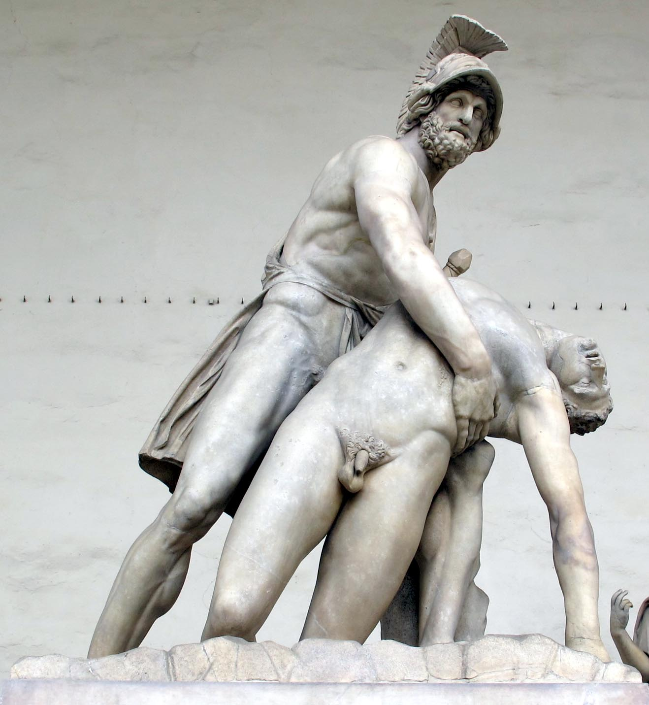 Arte romana, patroclo e menelao